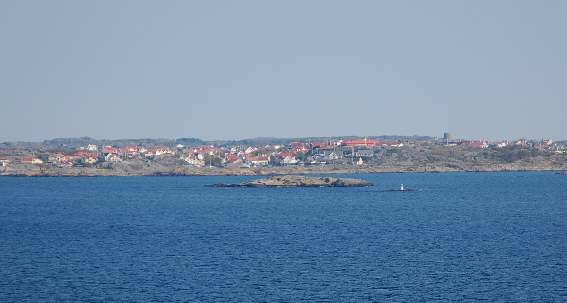 Insel im Schärengarten vor Göteborg